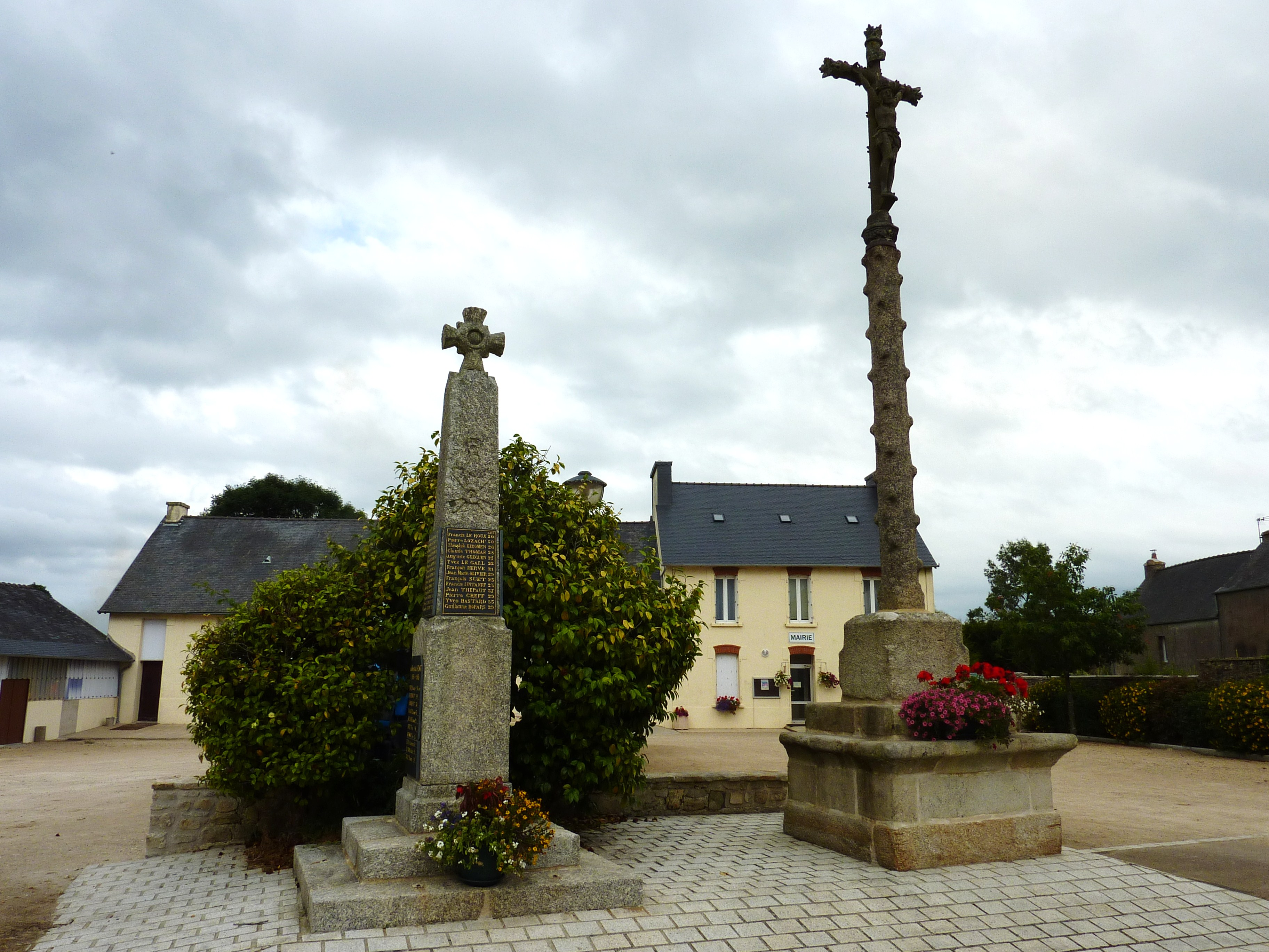 Bolazec: Calvaire, monument aux morts et mairie